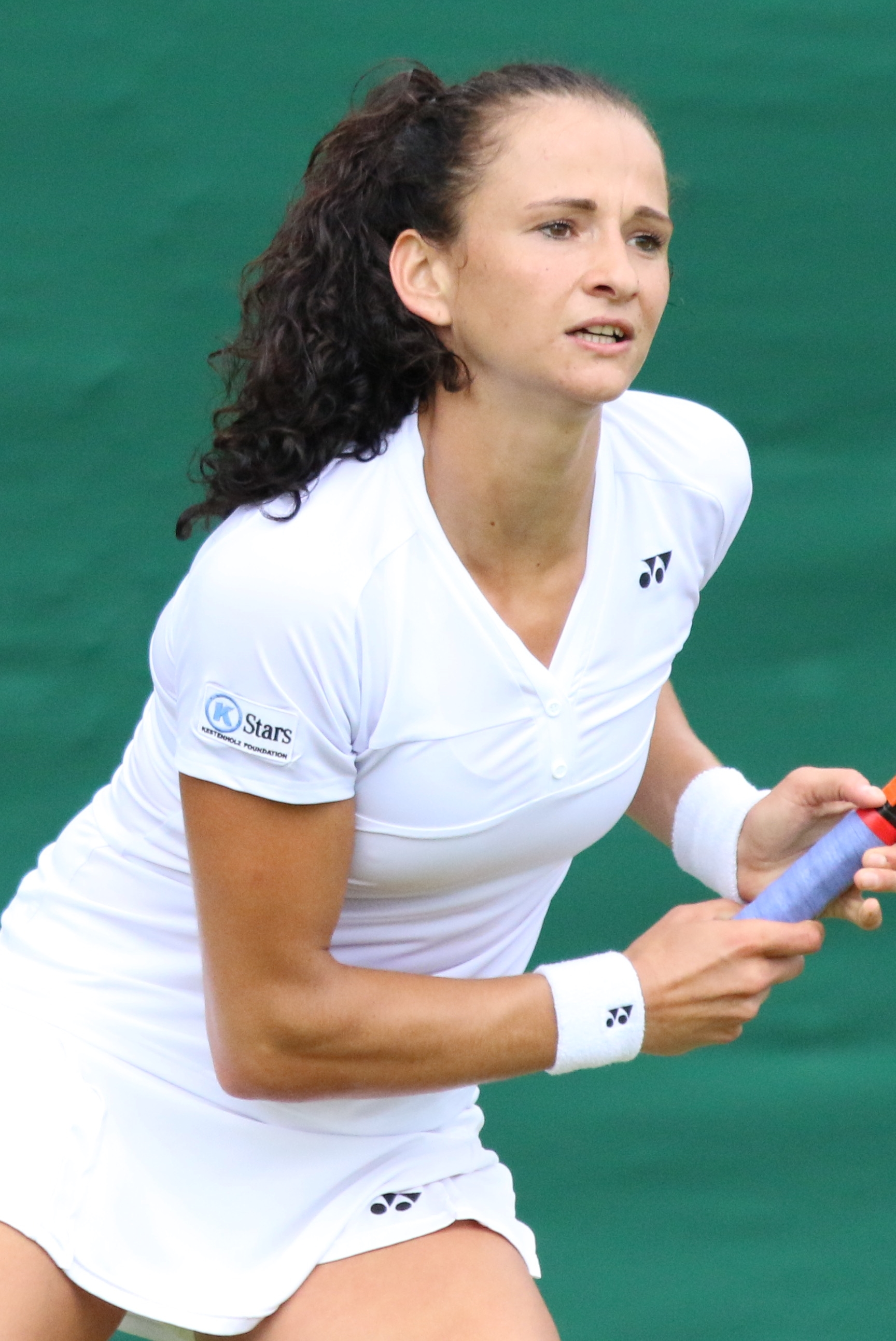 Sadikovic WMQ16 (7)